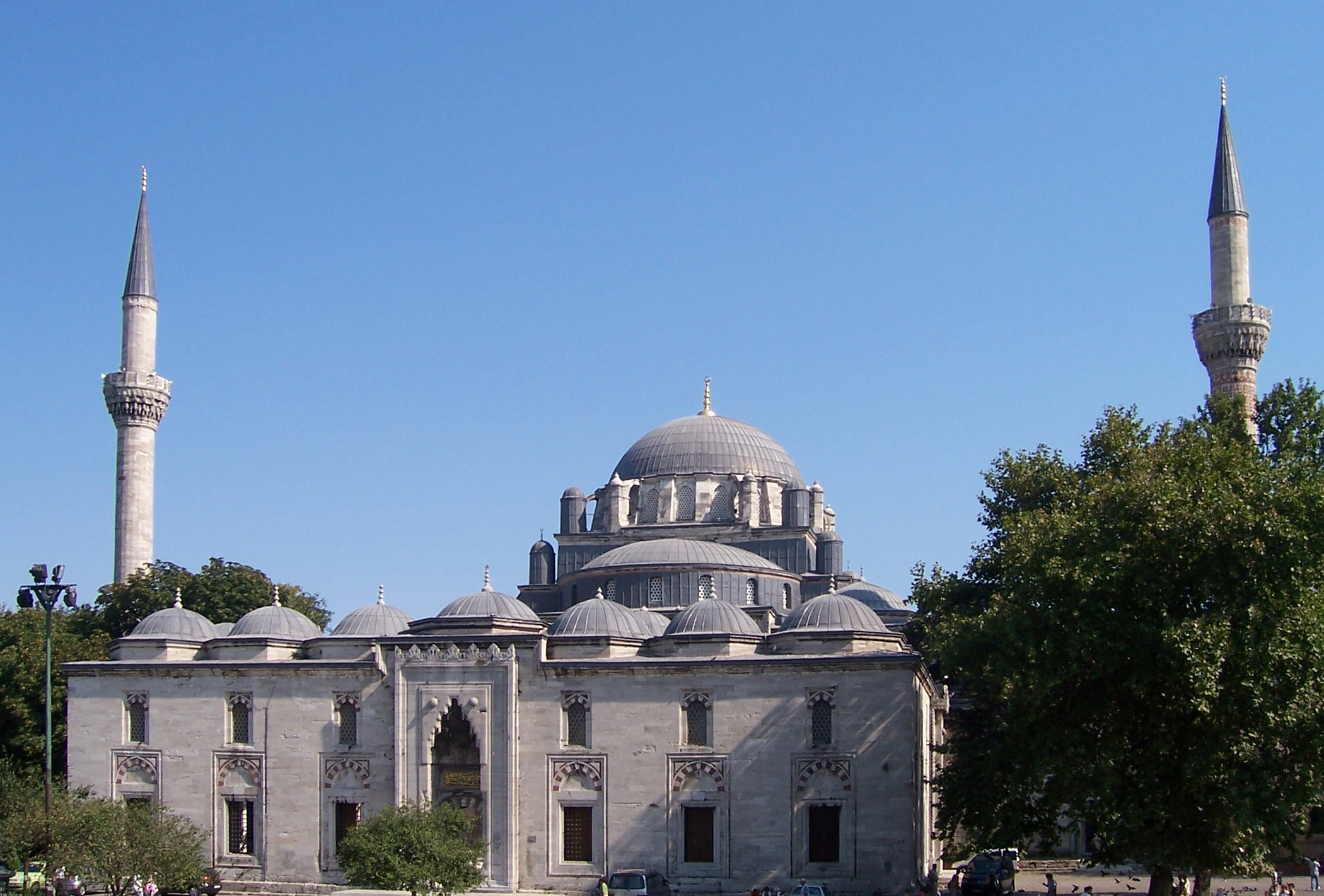 Bayazid II Mosque (Bayezid Camii), Istanbul, Turkey